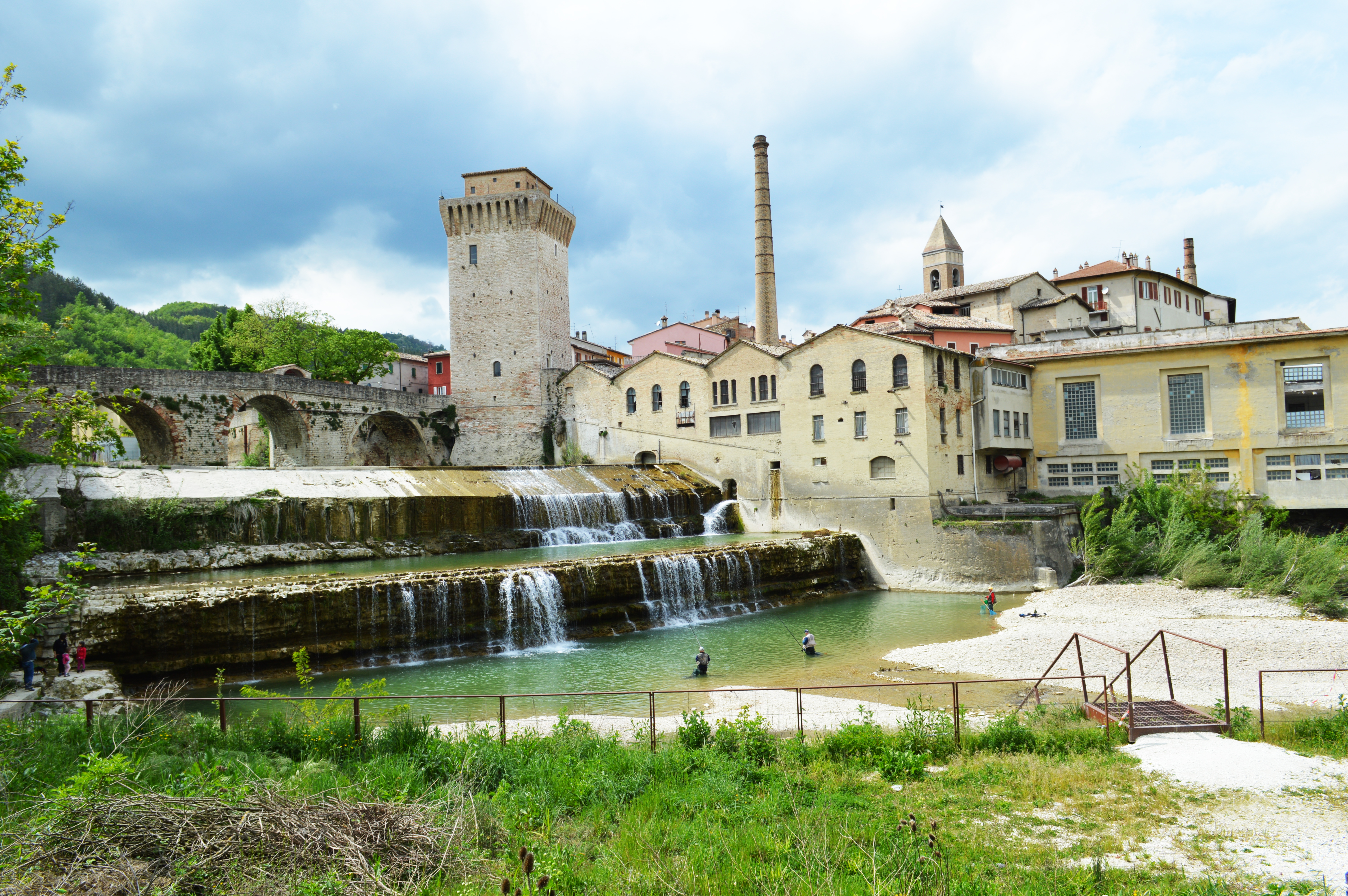 Complesso monumentale, Torre Medioevale e Ponte Romano This is a photo of a monument which is part of cultural heritage of Italy.